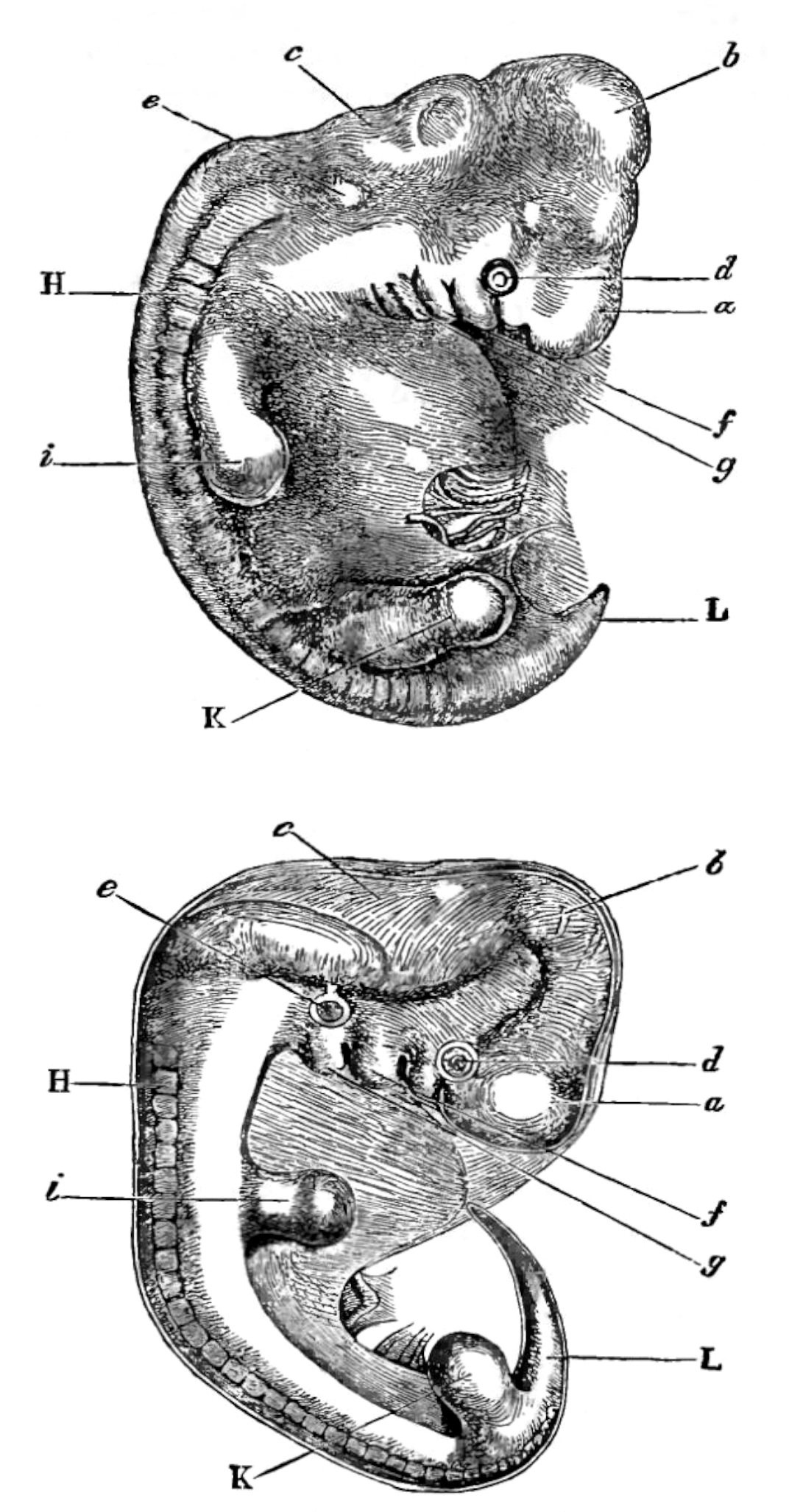 "Die obere Figur ist ein menschlicher Embryo nach [Alexander] Ecker, die untere der eines Hundes nach [Theodor von] Bischoff. a) Vorderhirn, Grosshirnhemisphären etc. b) Mittelhirn, Vierhügel, c) Hinterhirn, Kleinhirn, verlängertes Mark, d) Auge, e) Ohr. f) Erster Visceralbogen. g) Zweiter Visceralbogen. H) Wirbelsäule und Muskelmasse, i) Vordere Gliedmaassen. K) Hintere Gliedmaassen. L) Schwanz oder Coceyx."